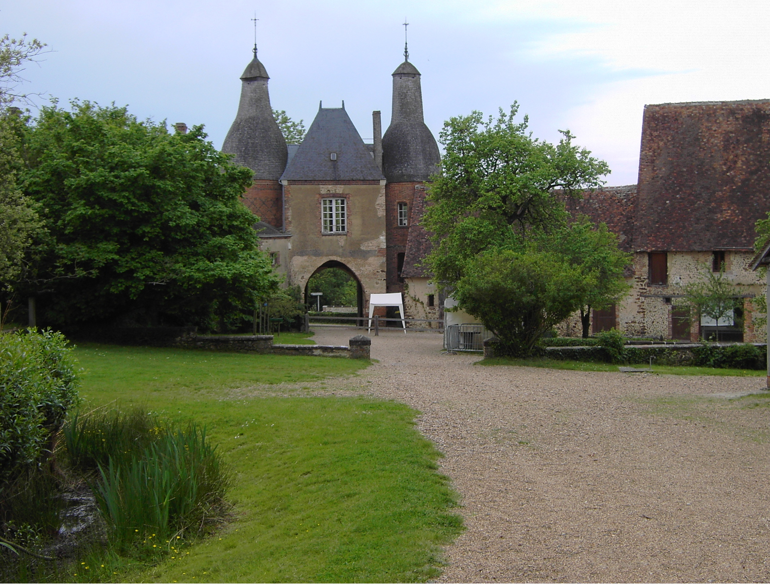 Commanderie templière d'Arville (Loir-et-Cher, France)